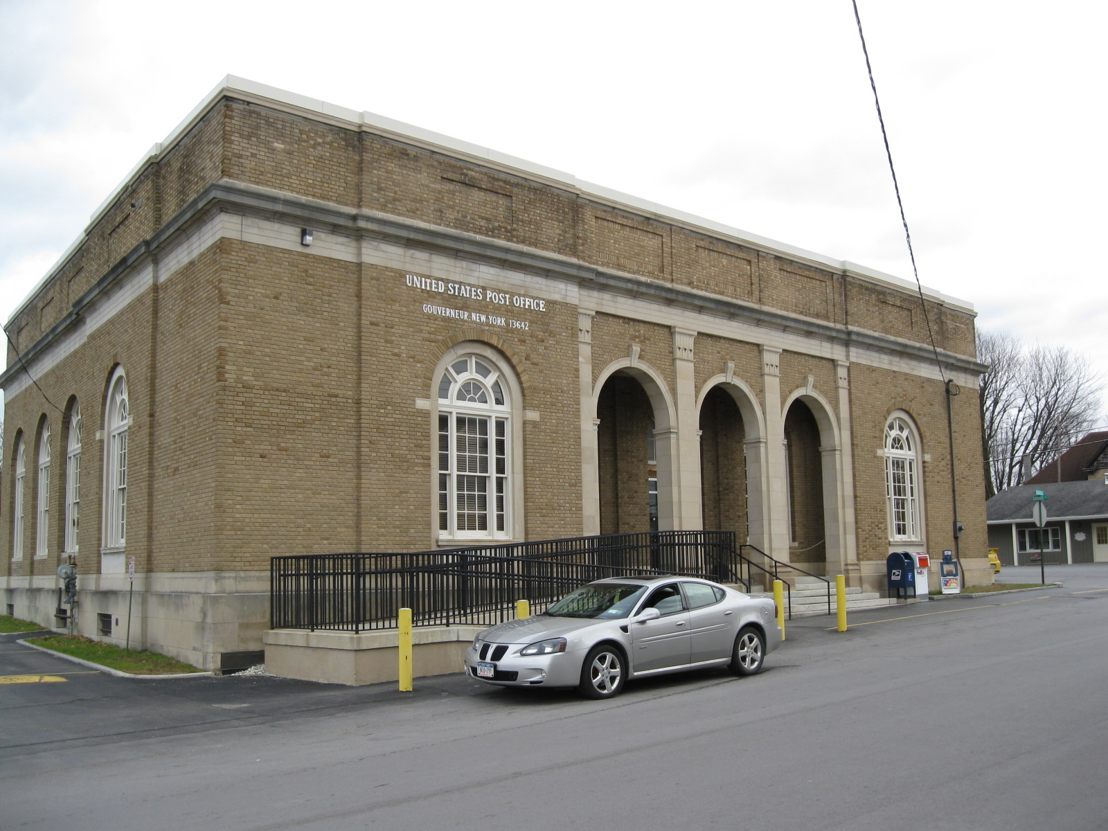 Gouverneur, New York